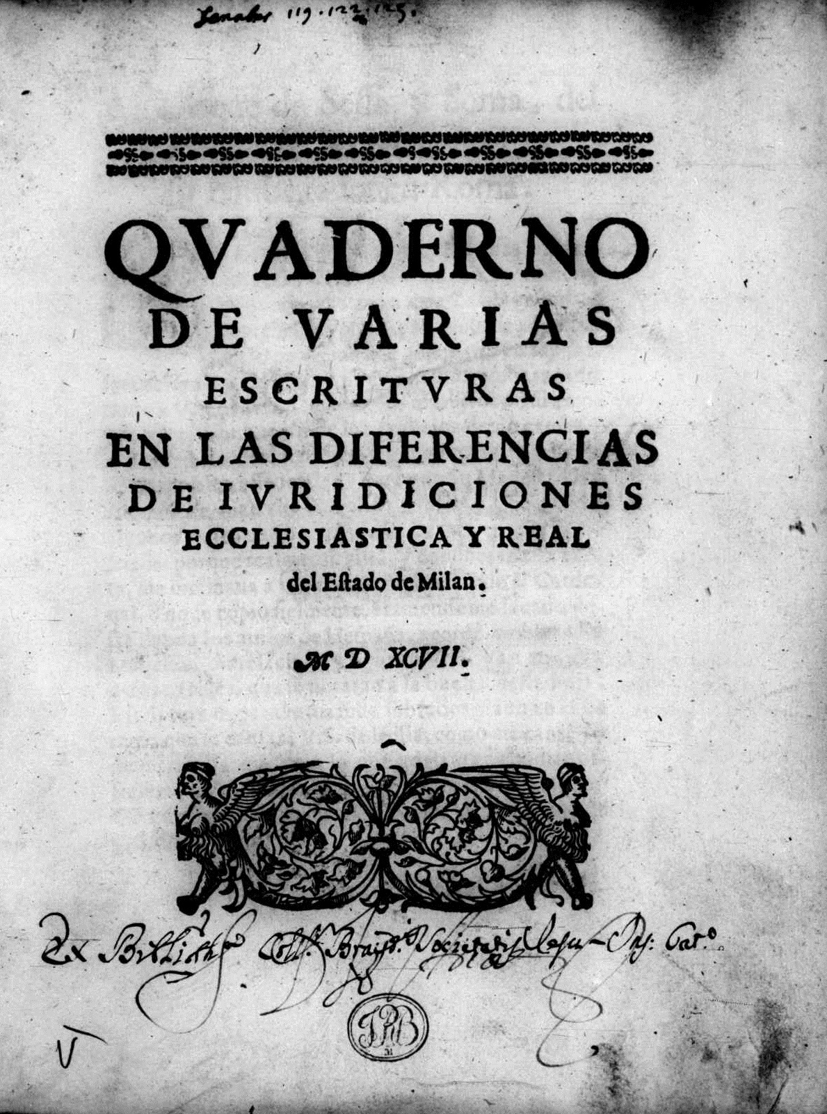 Frontespizio